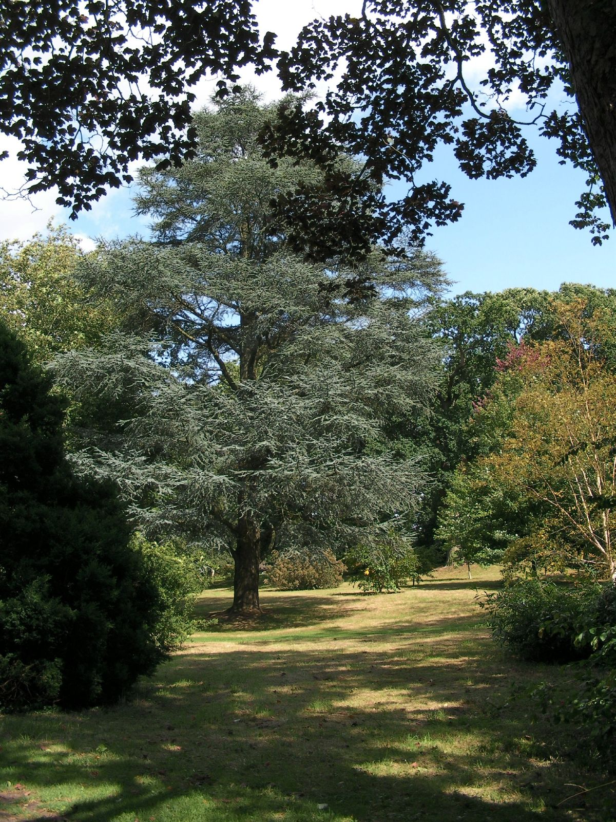 Wakehurst Place gardens